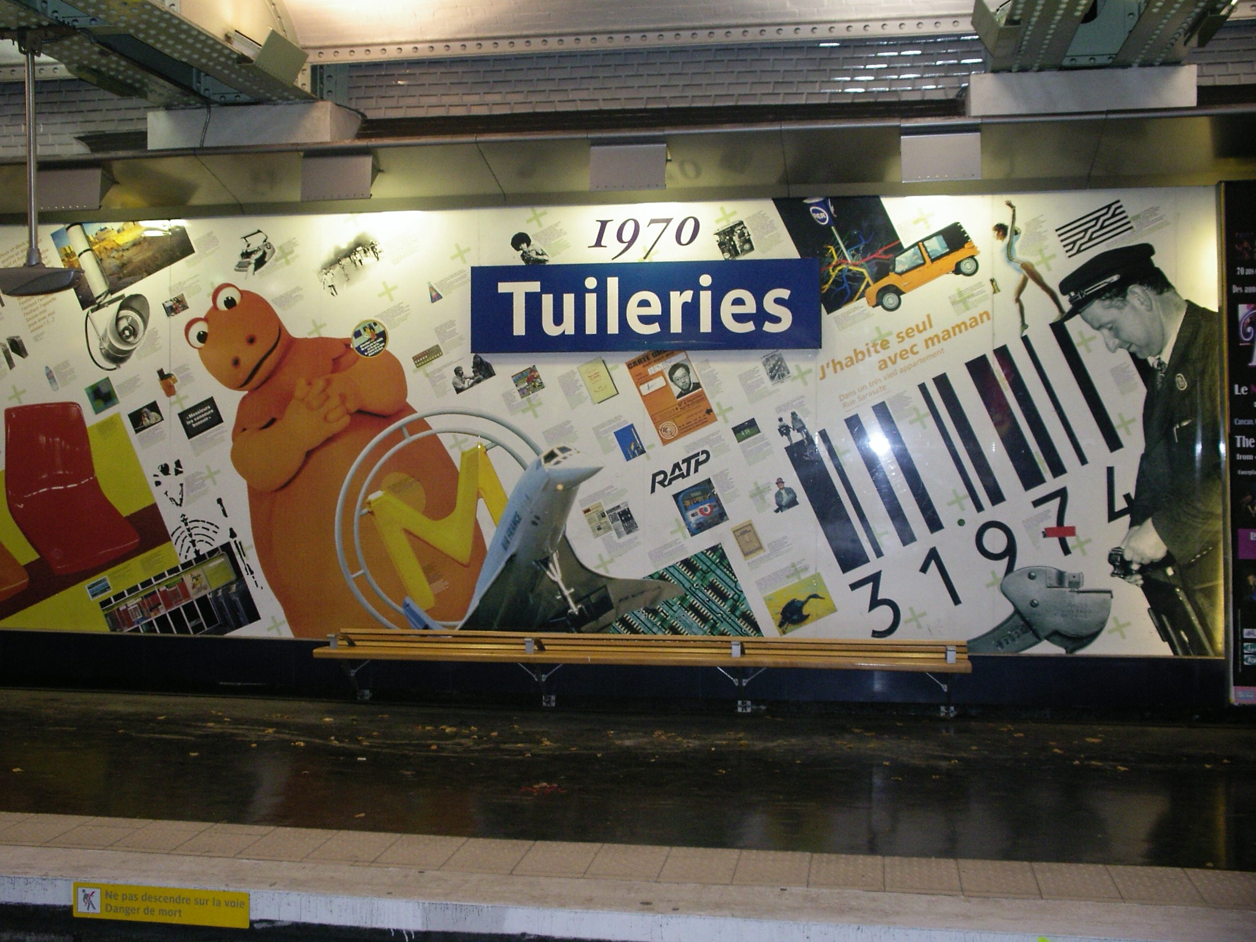 zelfgemaakte foto